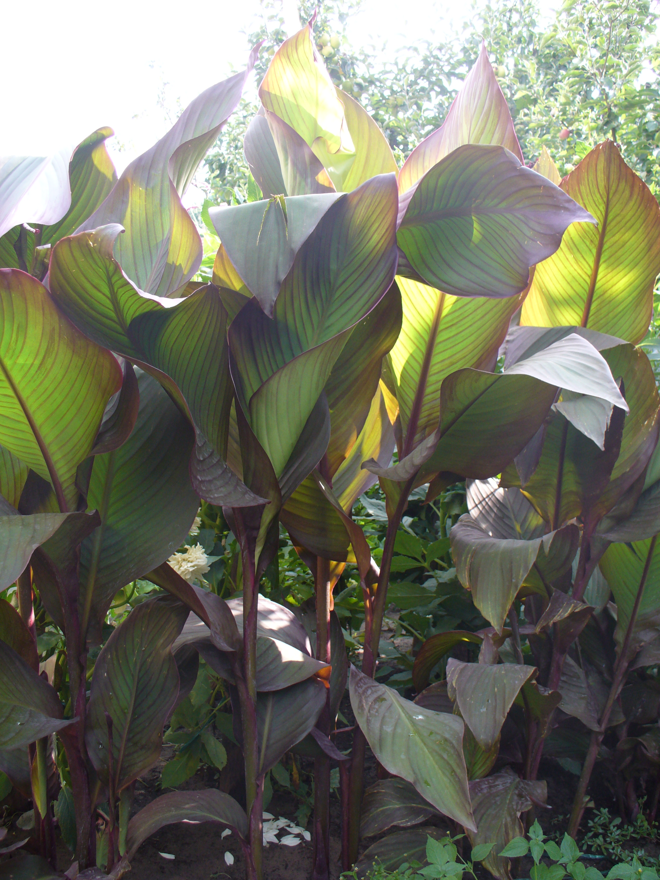 Canna generalis példányok egy orgoványi kertben